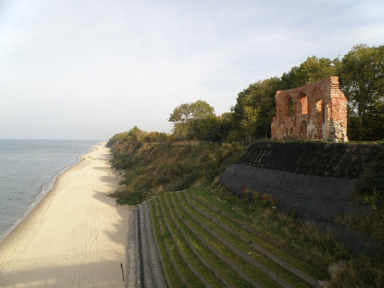 kościółek i plaża w Trzęsaczu - widok z pomostu